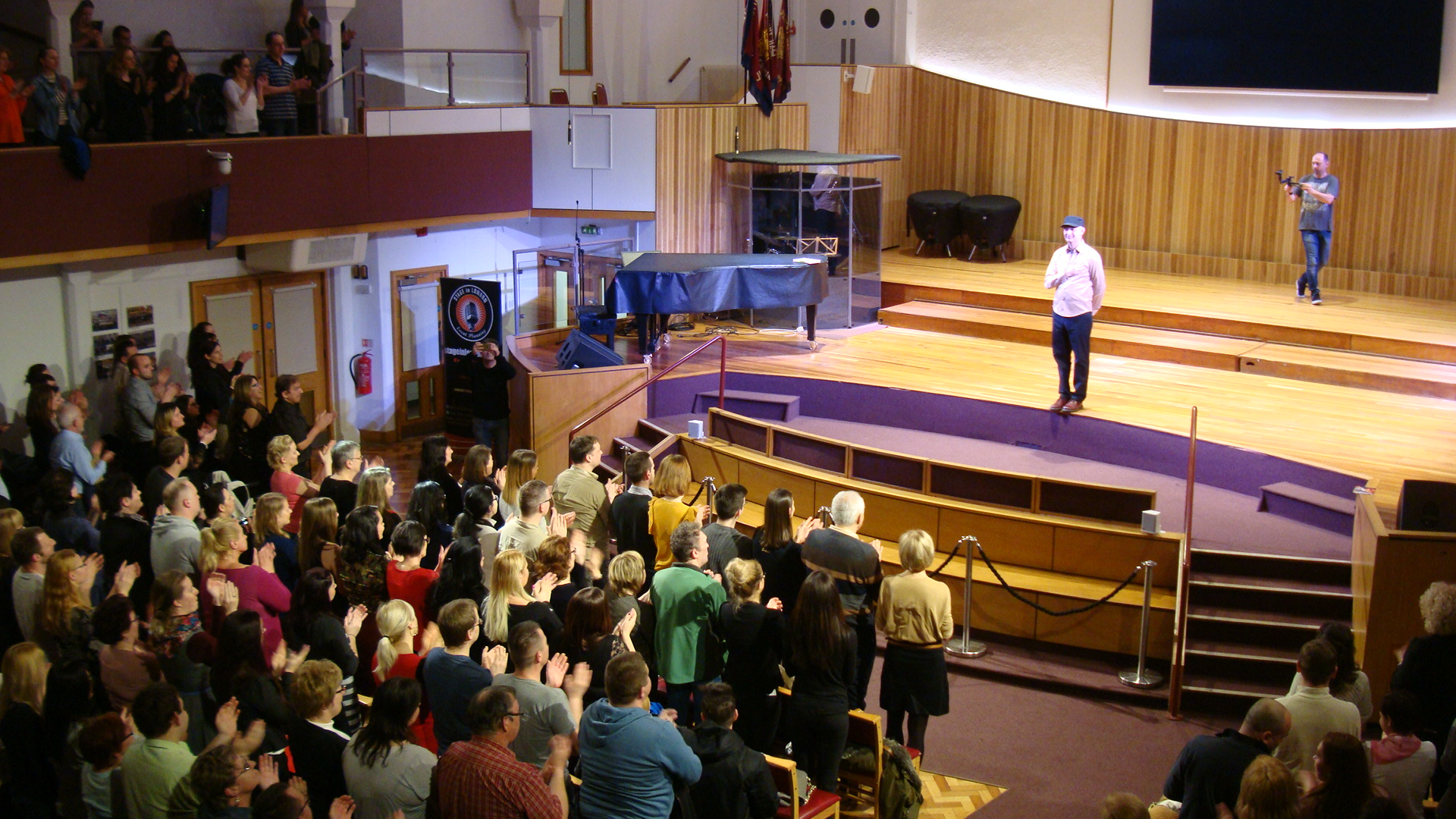 Vujity Tvrtko és közönsége Londonban a Regent Hall-ban, a Túl minden határon című előadasán